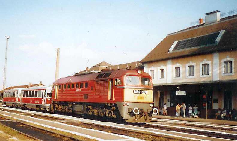 Az orosházi vasútállomás